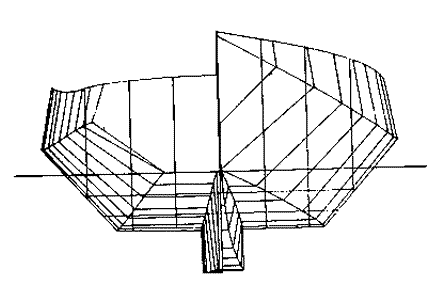 Een Scheldeschouw